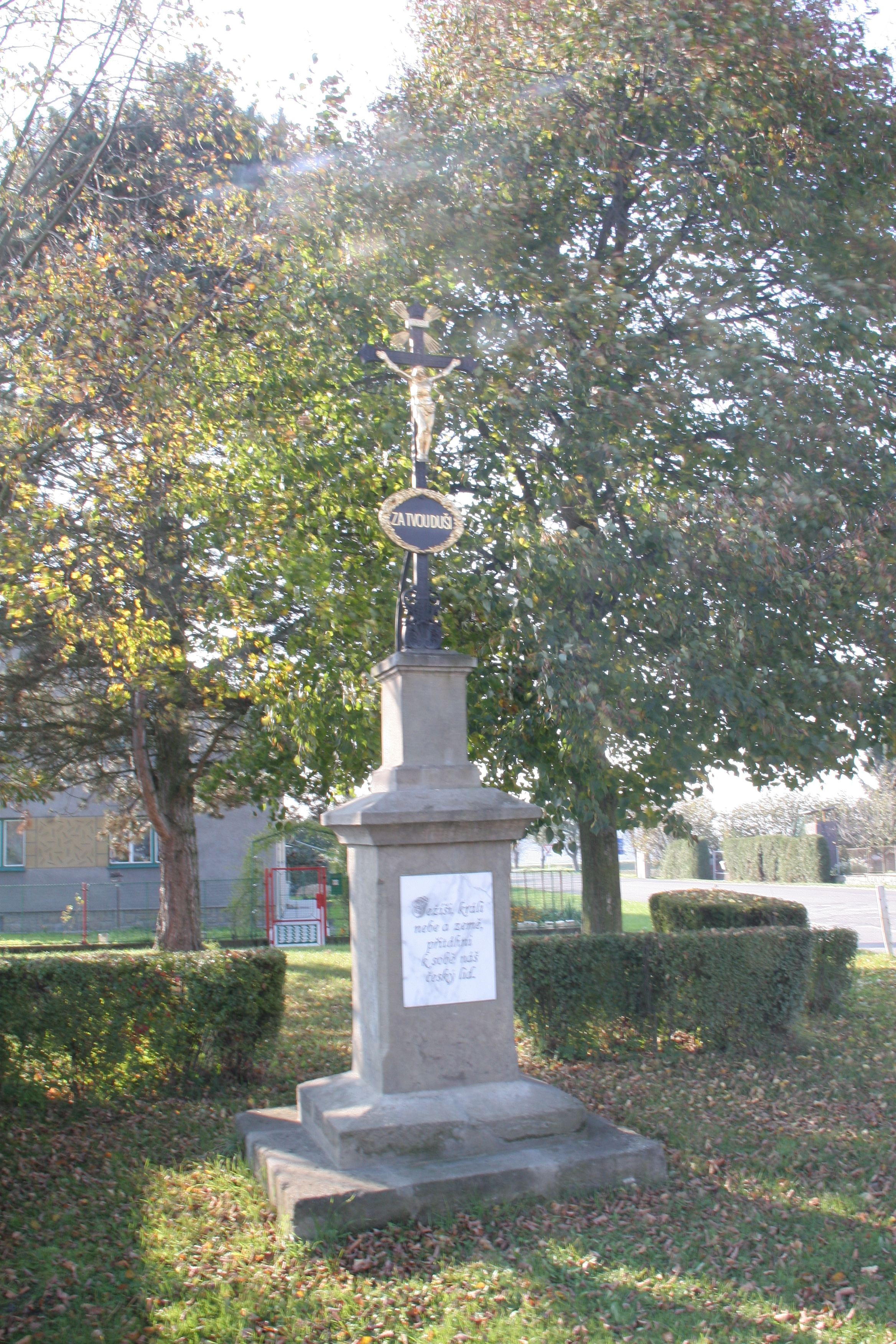 Nová Ves kříž